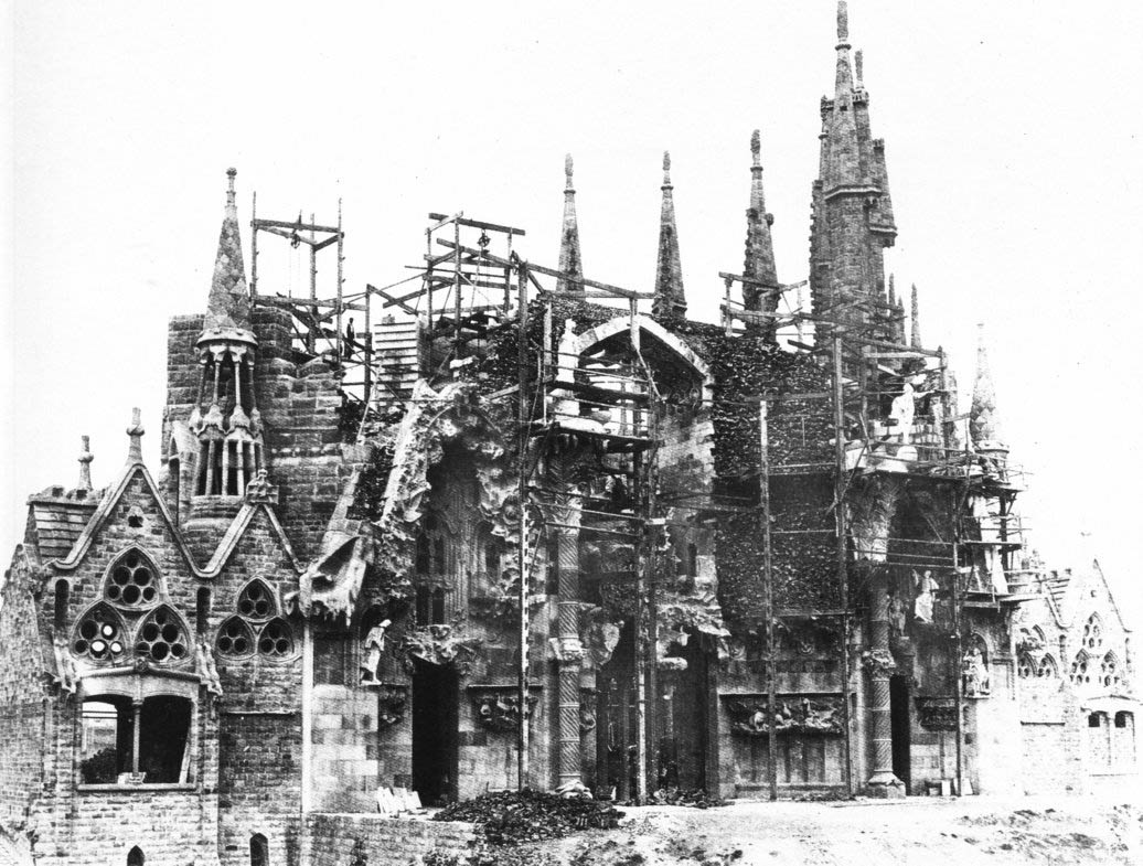 Obras de la Sagrada Familia (1897).